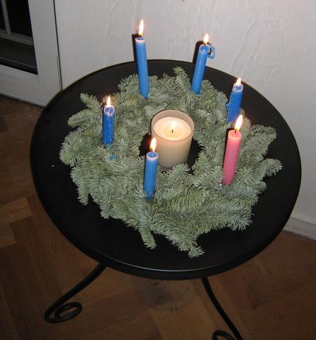 Couronne d'Avent, dans un foyer qui observe une Avent de 6 semaines. Cinq bougies bleues, une bougie rose pour la semaine de Gaudete; et au milieu une bougie blanche, allumée aux premières vêpres de Noël.